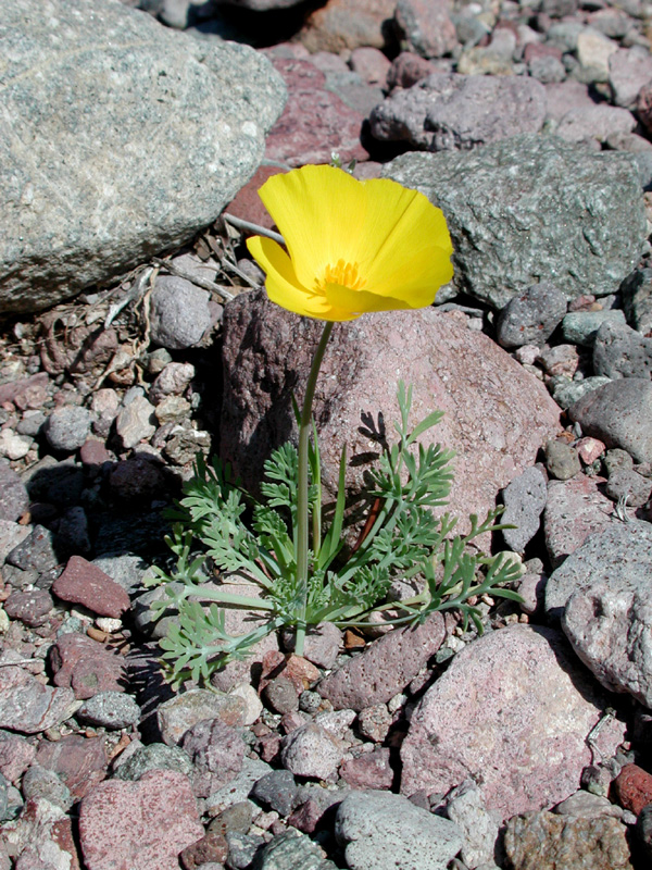 Eschscholtzia californica — Gila Bend Mountains, Maricopa County, Arizona, USA.